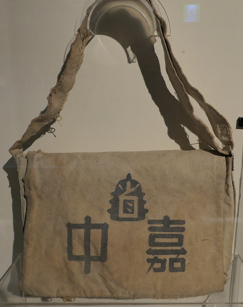 臺灣省立嘉義中學書包。攝於國立臺灣歷史博物館。